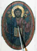 Исус Вседържител от църквата "Свети Николай" в Горгопик, Егейска Македония, Гърция.